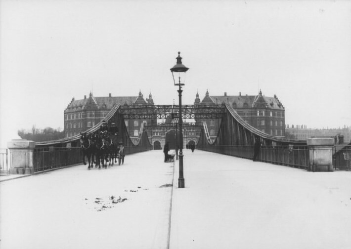 Langeliniebroen